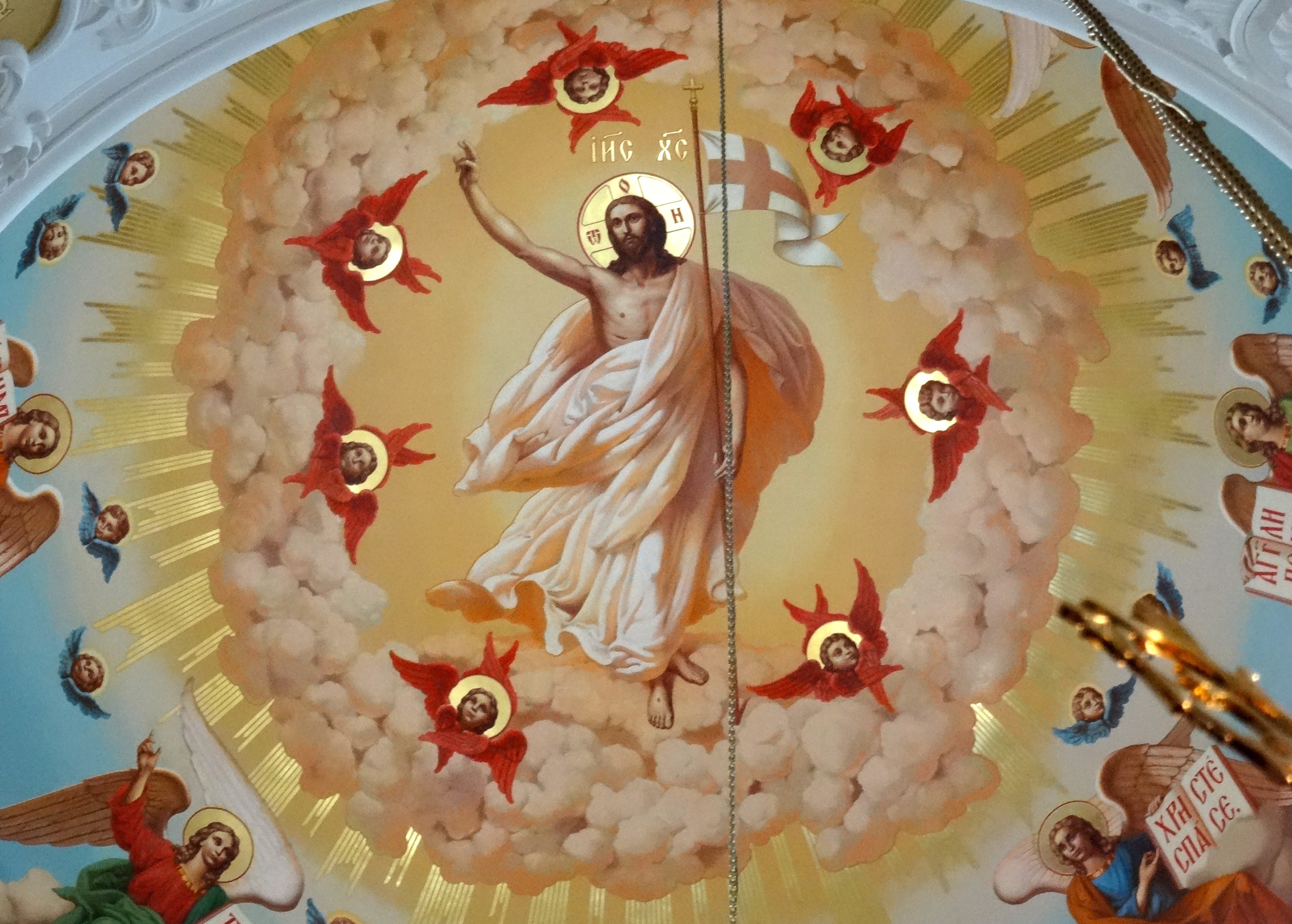 New Jerusalem Monastery